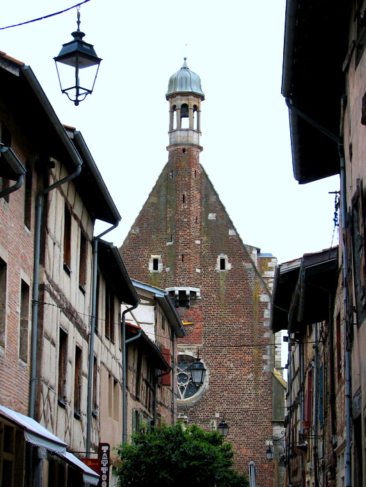 Châtillon-sur-Chalaronne, Église Saint-André